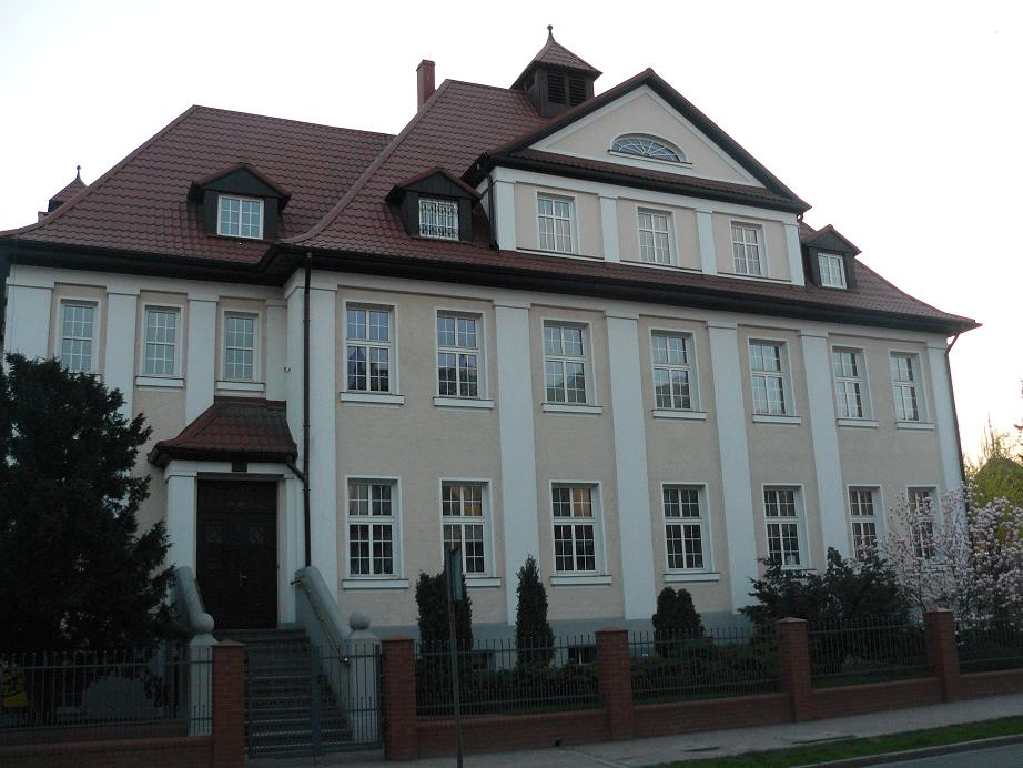 Gorzów Wielkopolski, ul. Kosynierów Gdyńskich 13/14 - siedziba Biowet Vetoquinol